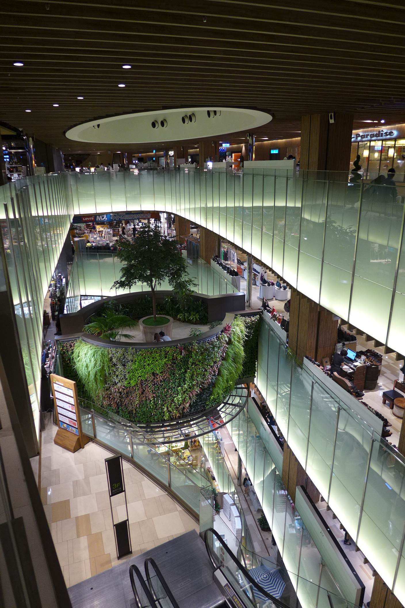 Q Square Atrium, Taipei